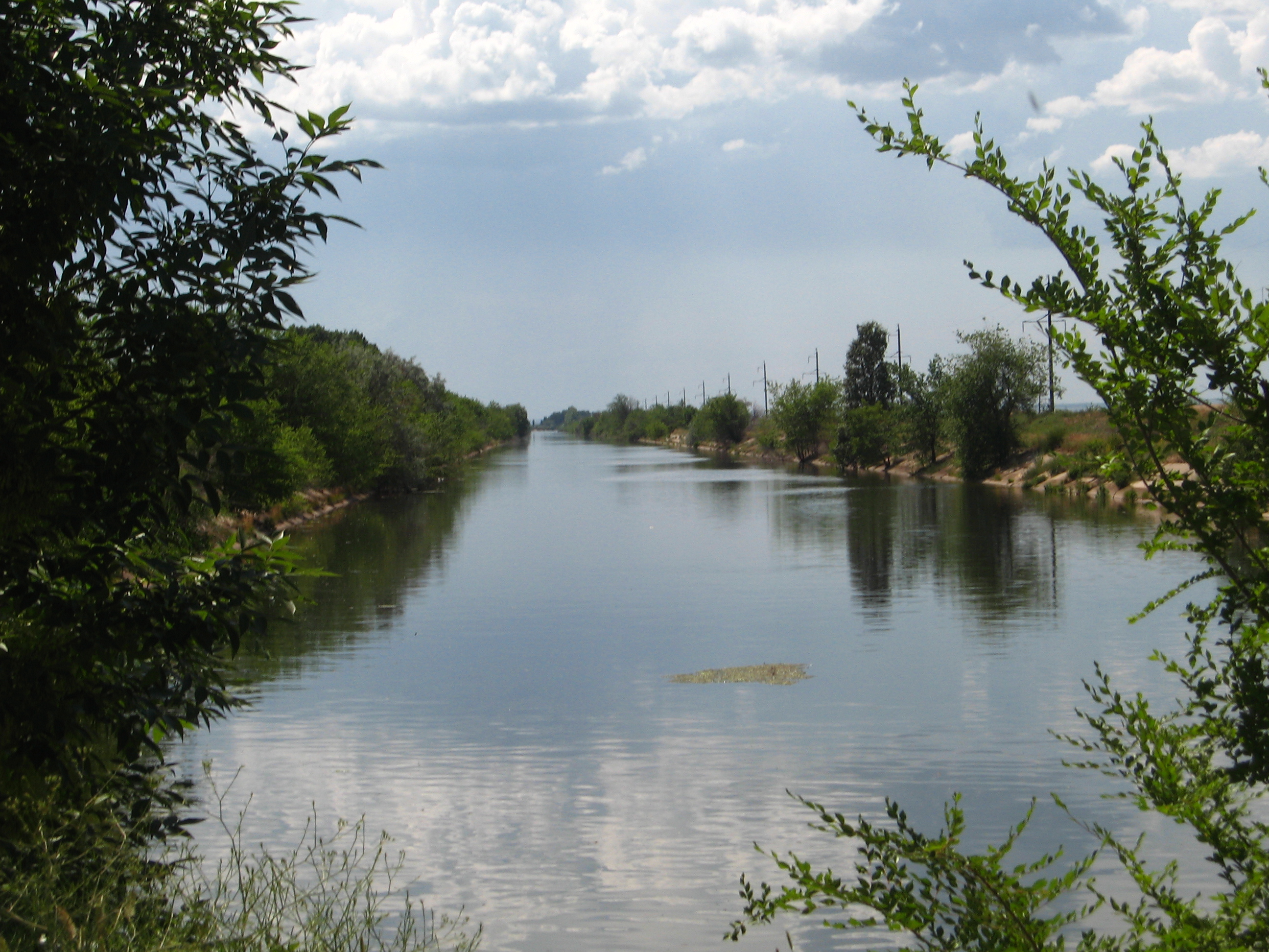 Кисловский магистральный канал Быковской оросительной системы у посёлка Песчаный. Быковский район Волгоградской области России